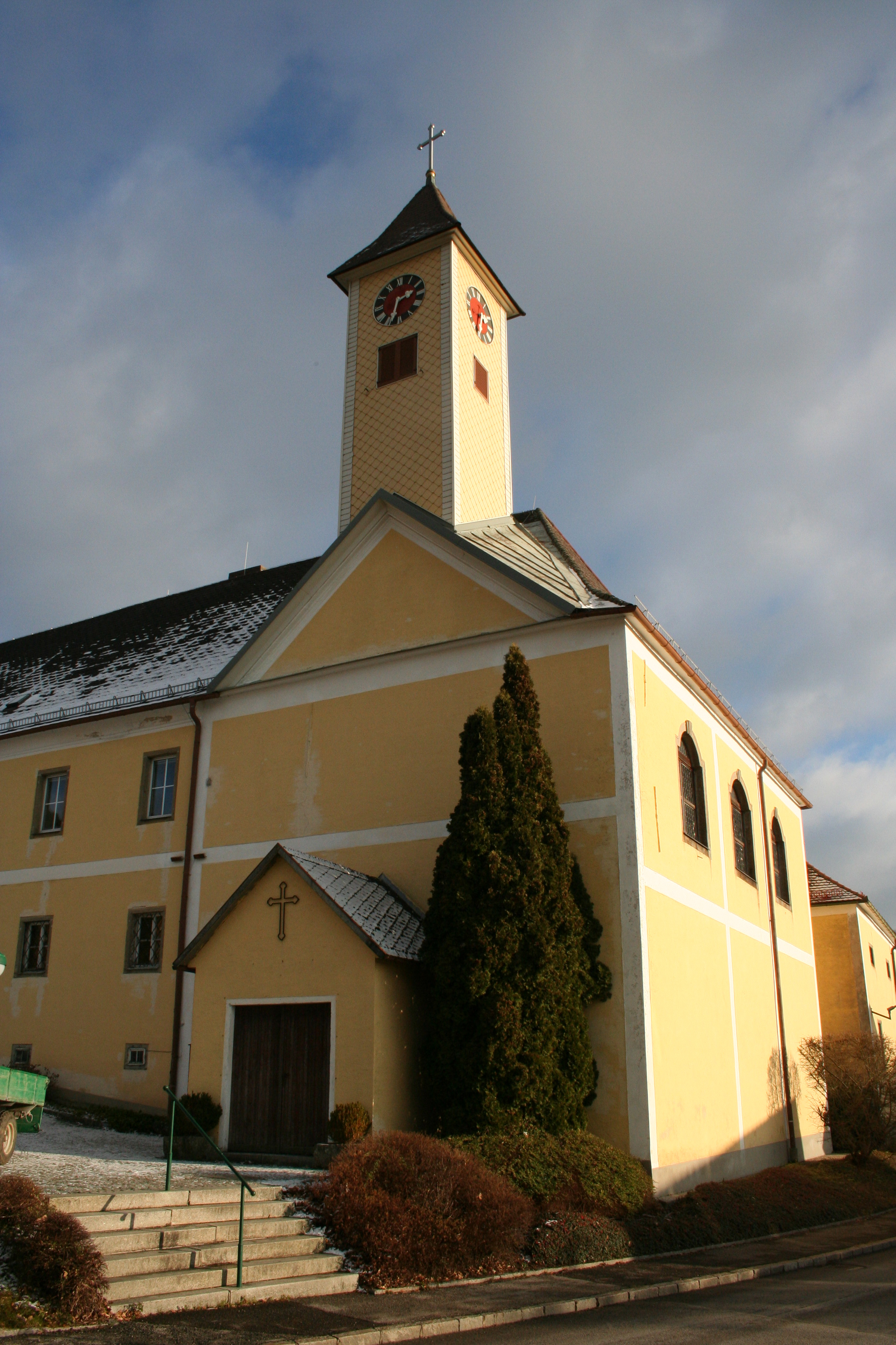 Sog. Neues Schloss mit Filialkirche Göttlicher Heiland